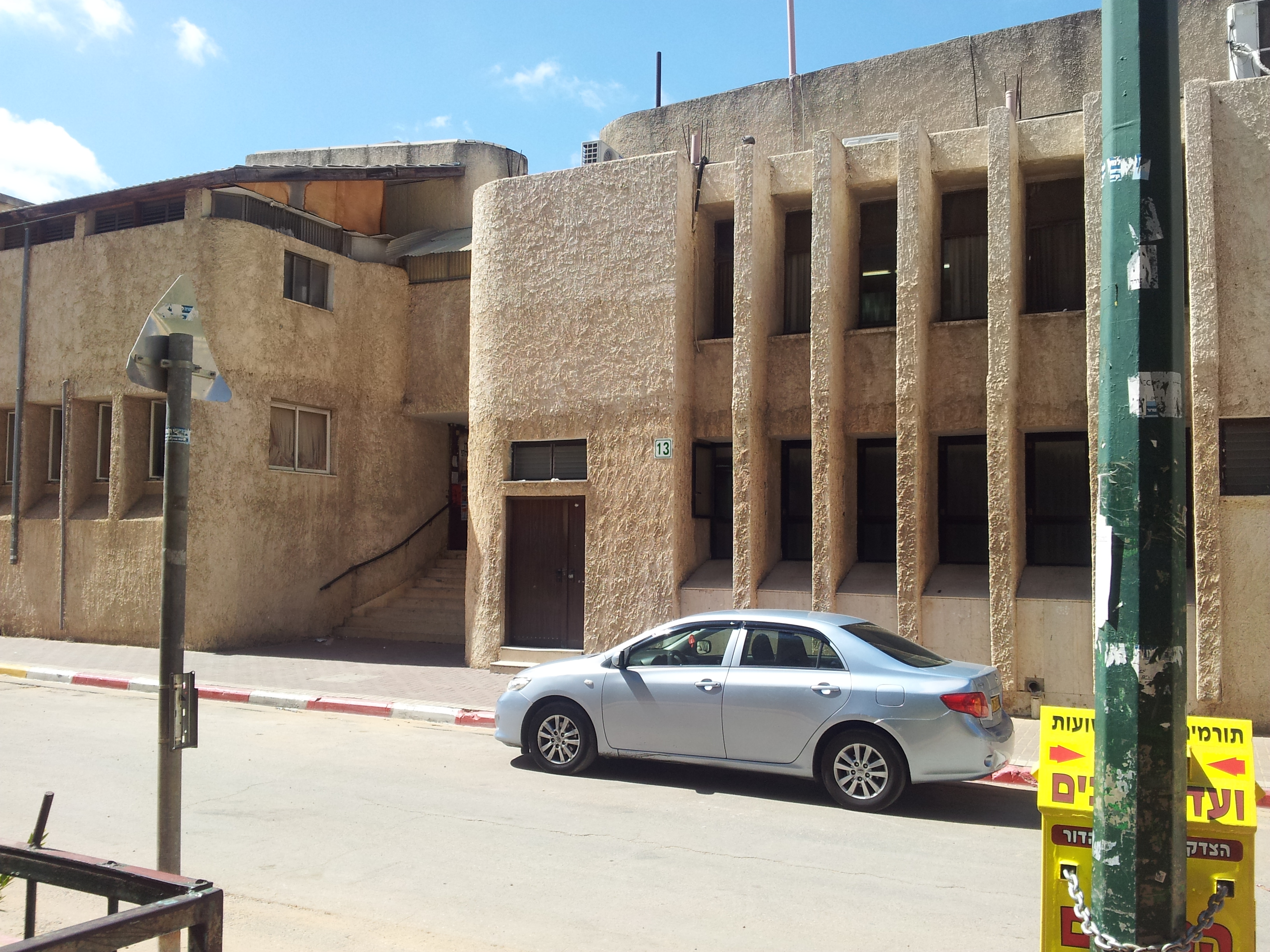 בית הכנסת המרכזי, בשכונת רמת אלחנן.